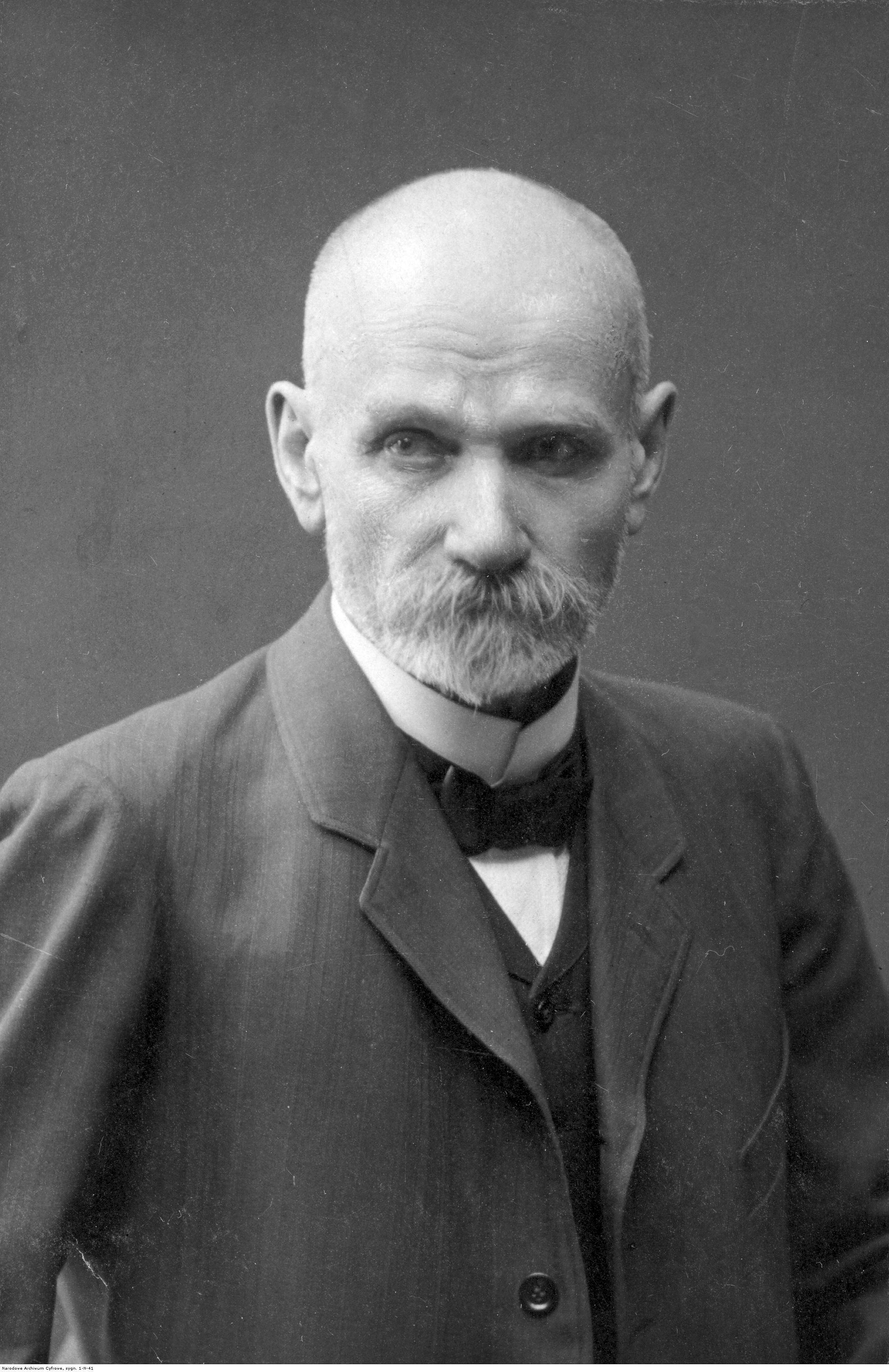 Портретна фотография на Ян Бодуен де Куртене, полски и руски езиковед